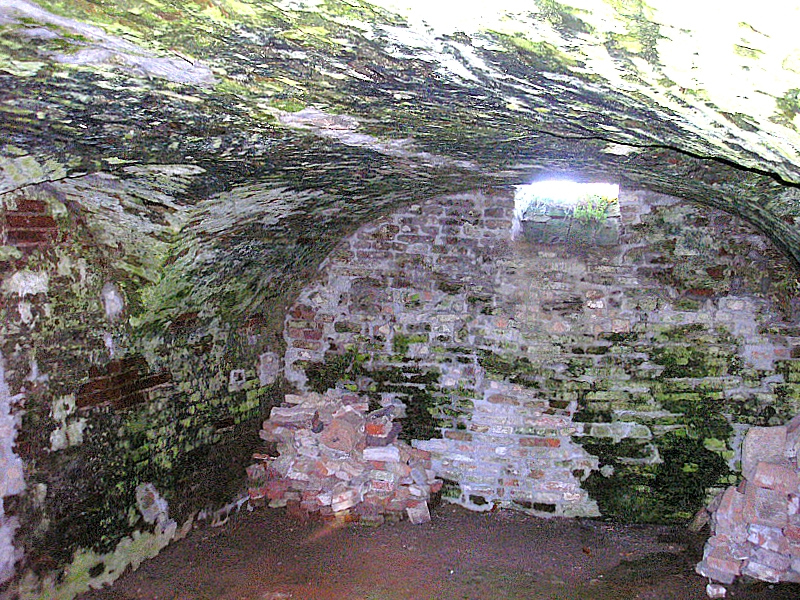 Burgstall Dasing (Landkreis Aichach-Friedberg, Bayerisch-Schwaben). Der Keller der Hauptburg. Blick nach Westen. Eigene Aufnahme, Nov. 2007 / Former Dasing Castle near Augsburg (Bavaria, Germany). The cellar of the central castle, looking west. Own photo, Nov. 2007